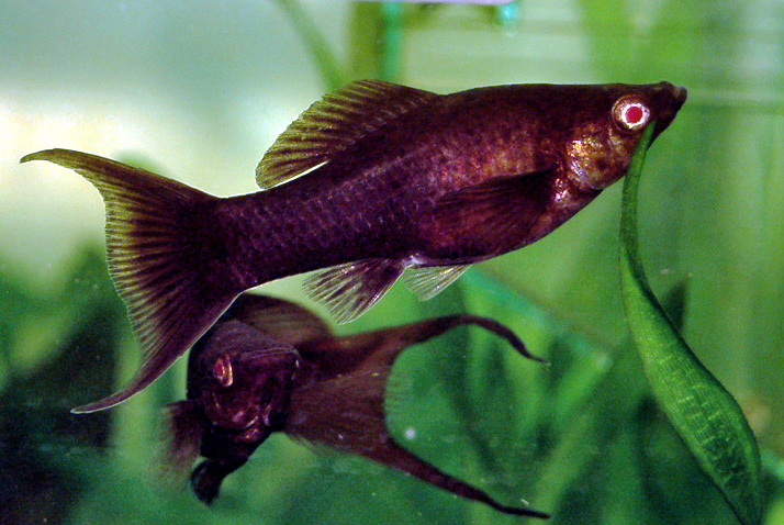 Coppia di Black Molly (Poecilia sphenops, Poecilia mexicana)